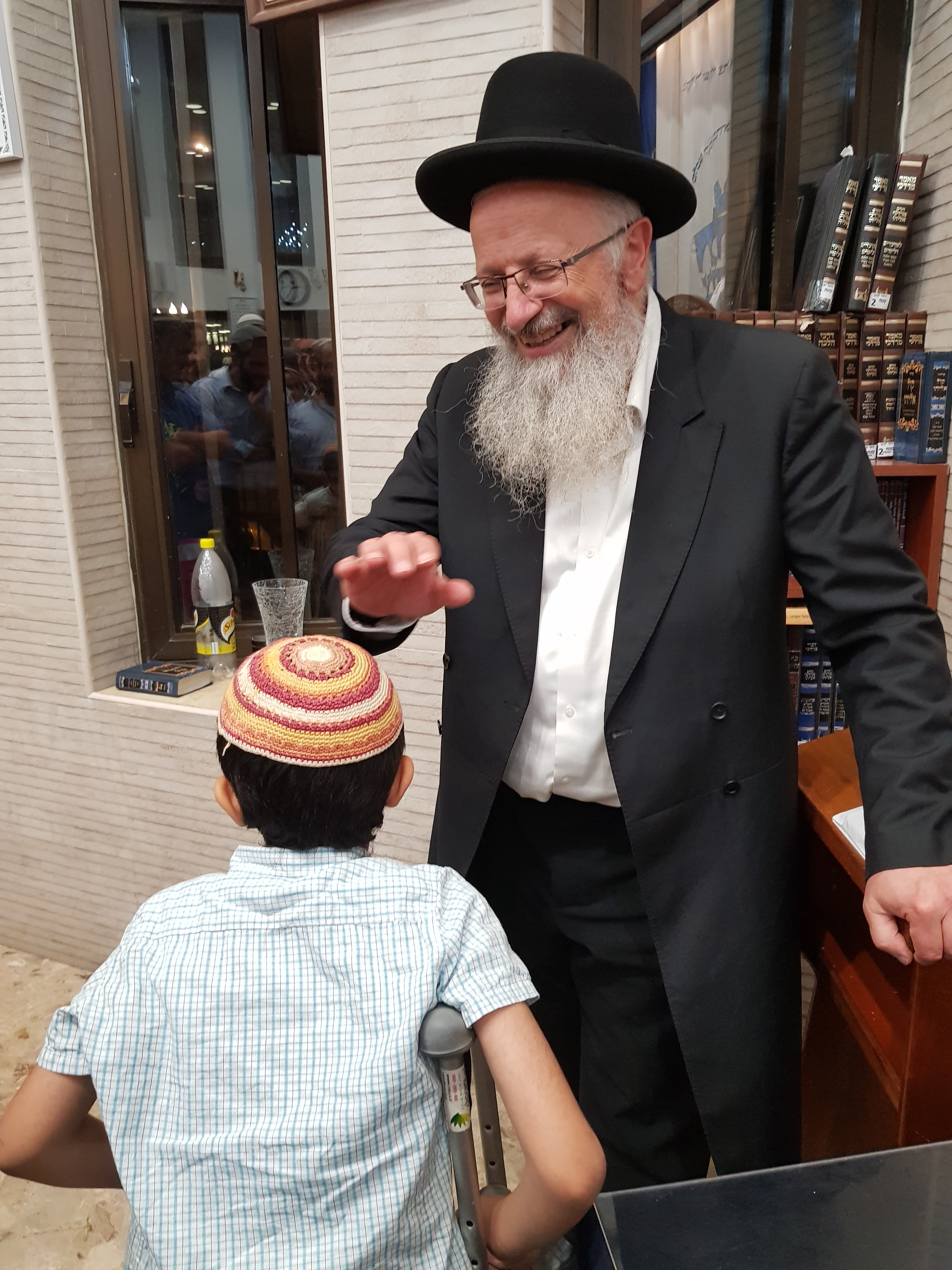 הרב שמואל מברך ילד בבית כנסת היכל יעקב, ירושלים